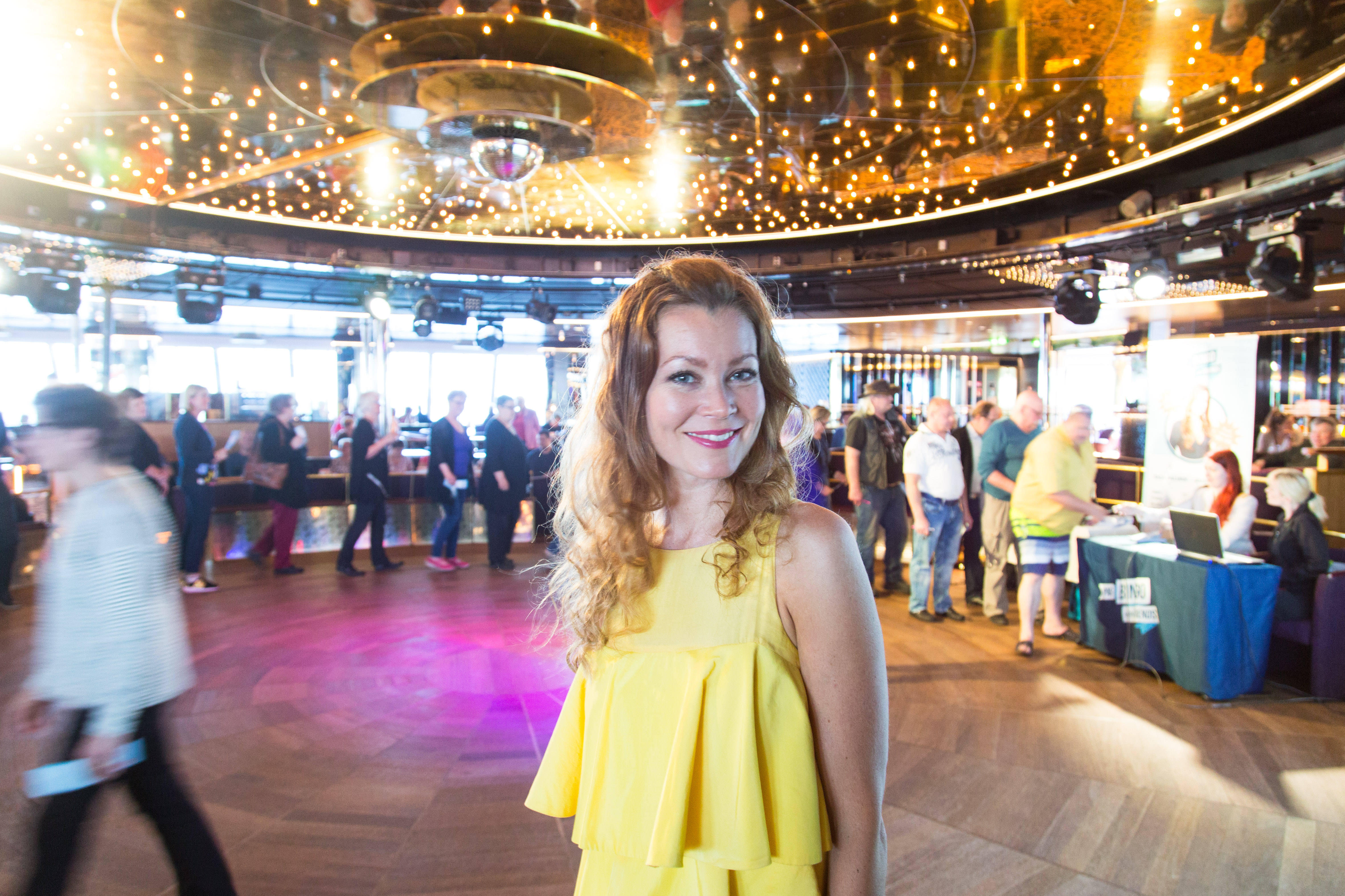 Saija Palin